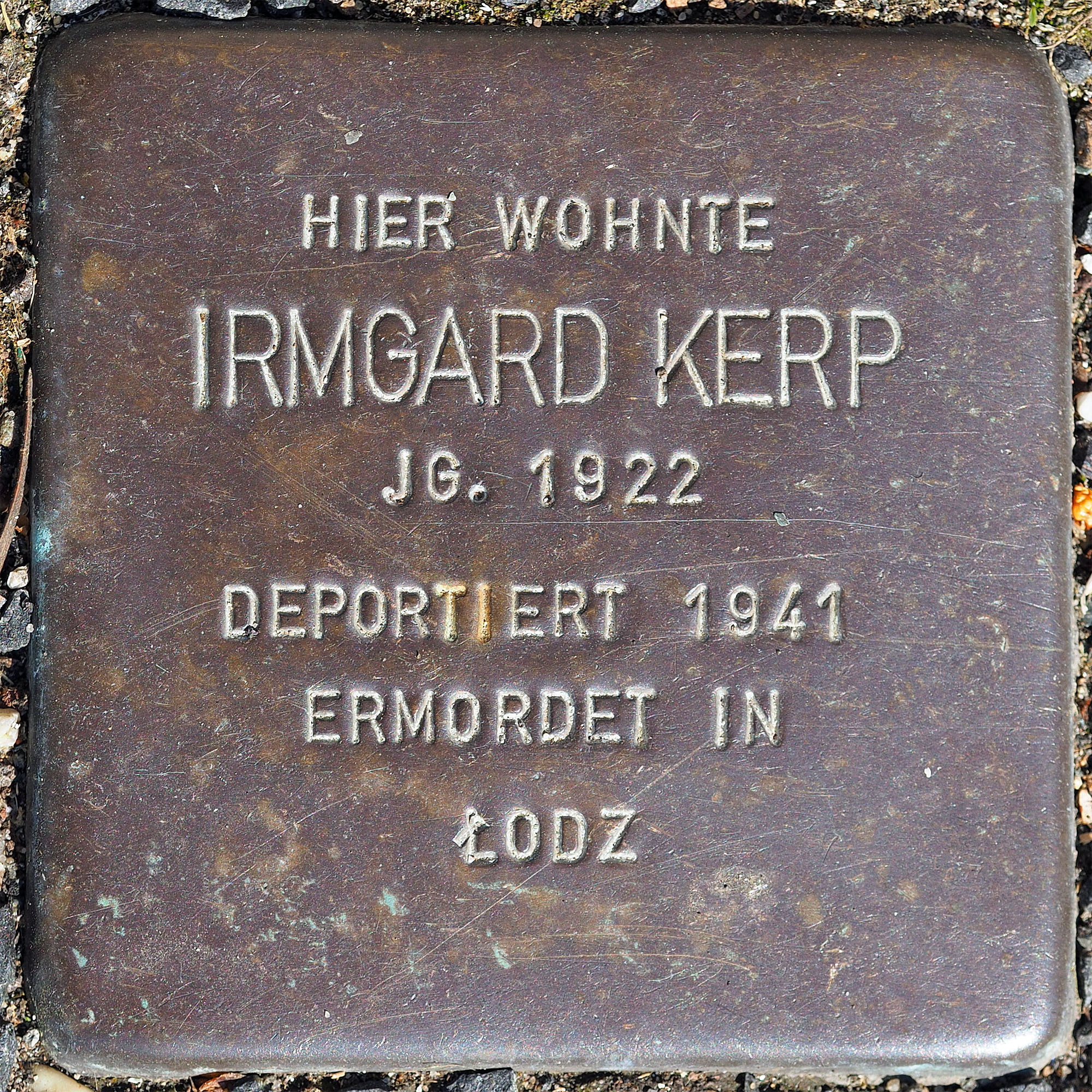 Stolpersteine MG: Kerp, Irmgard